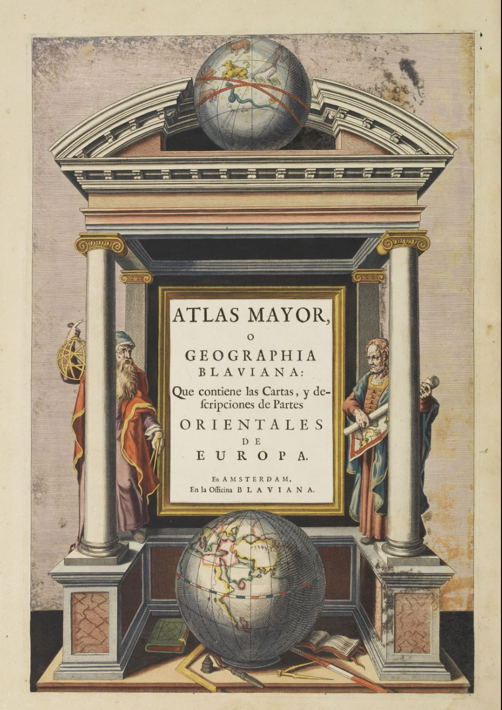 Portada del Atlas Mayor, la versión en castellano del Atlas maior de Joan Blaeu. Obra publicada en 10 volúmenes entre 1659 y 1672 en Amsterdam. 398 x 267 mm.